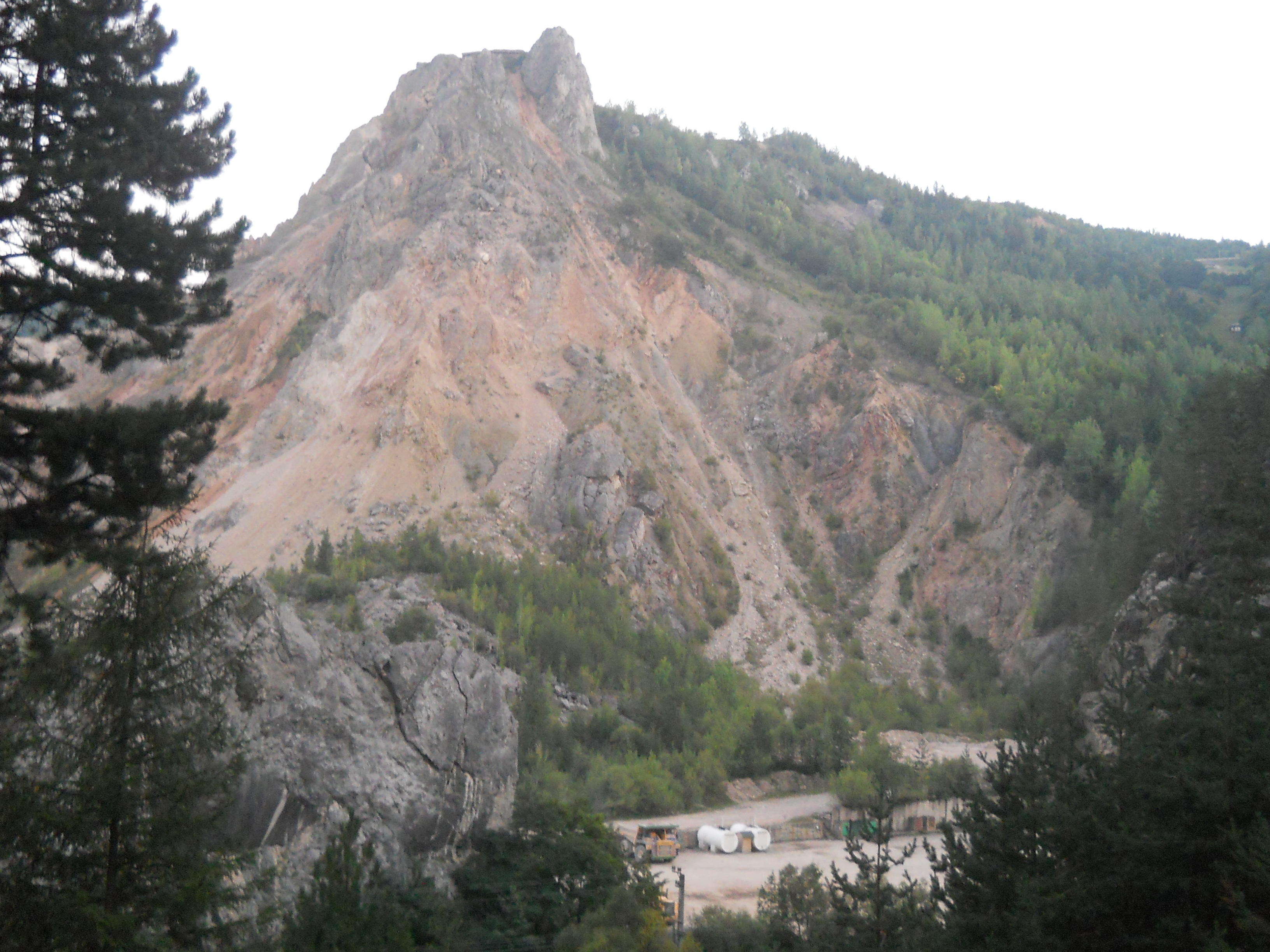 Cariera de calcar a fabricii de ciment HeidelbergCement Tașca de pe teritoriul comunei Bicaz-Chei.